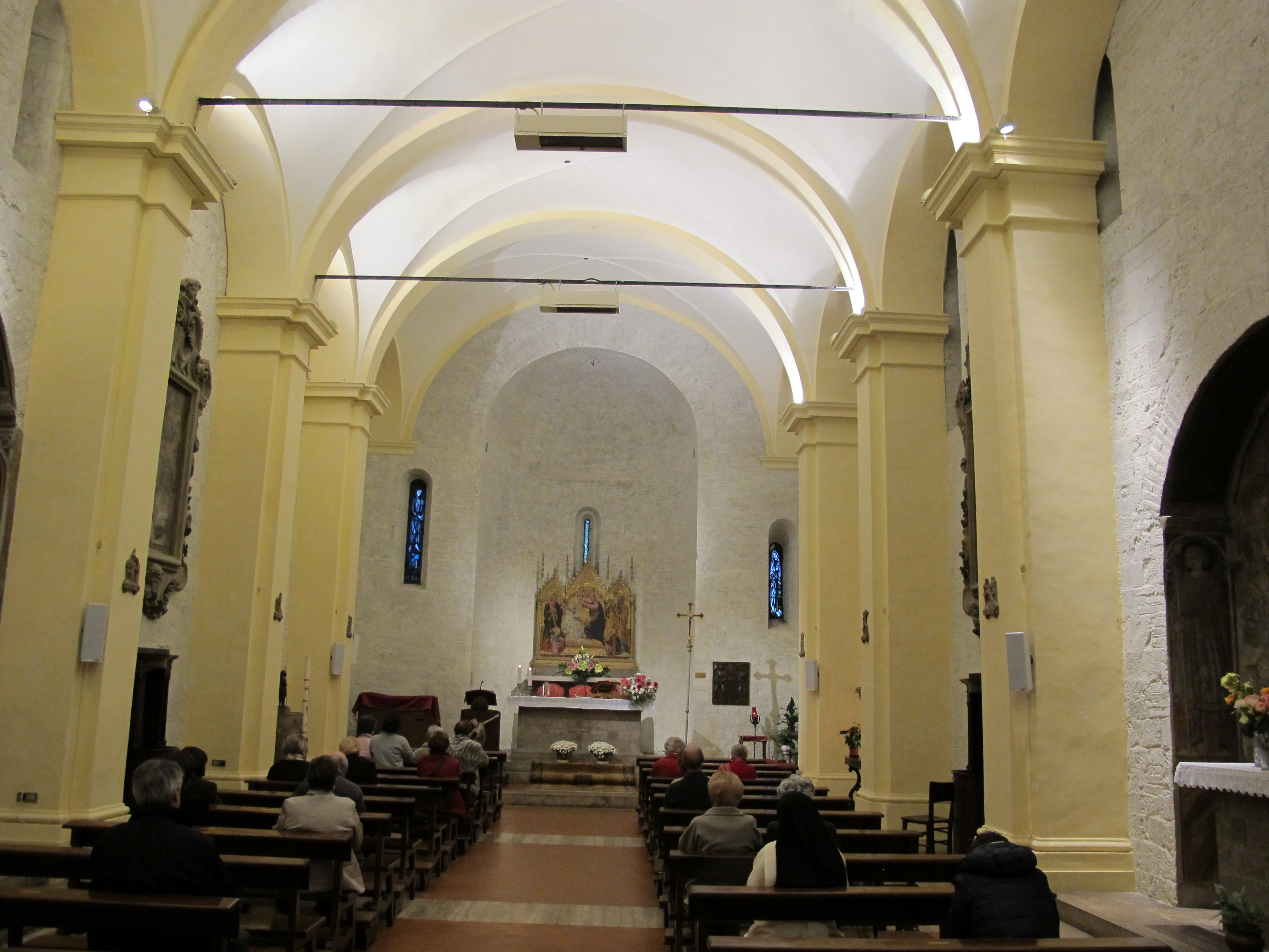 Siena